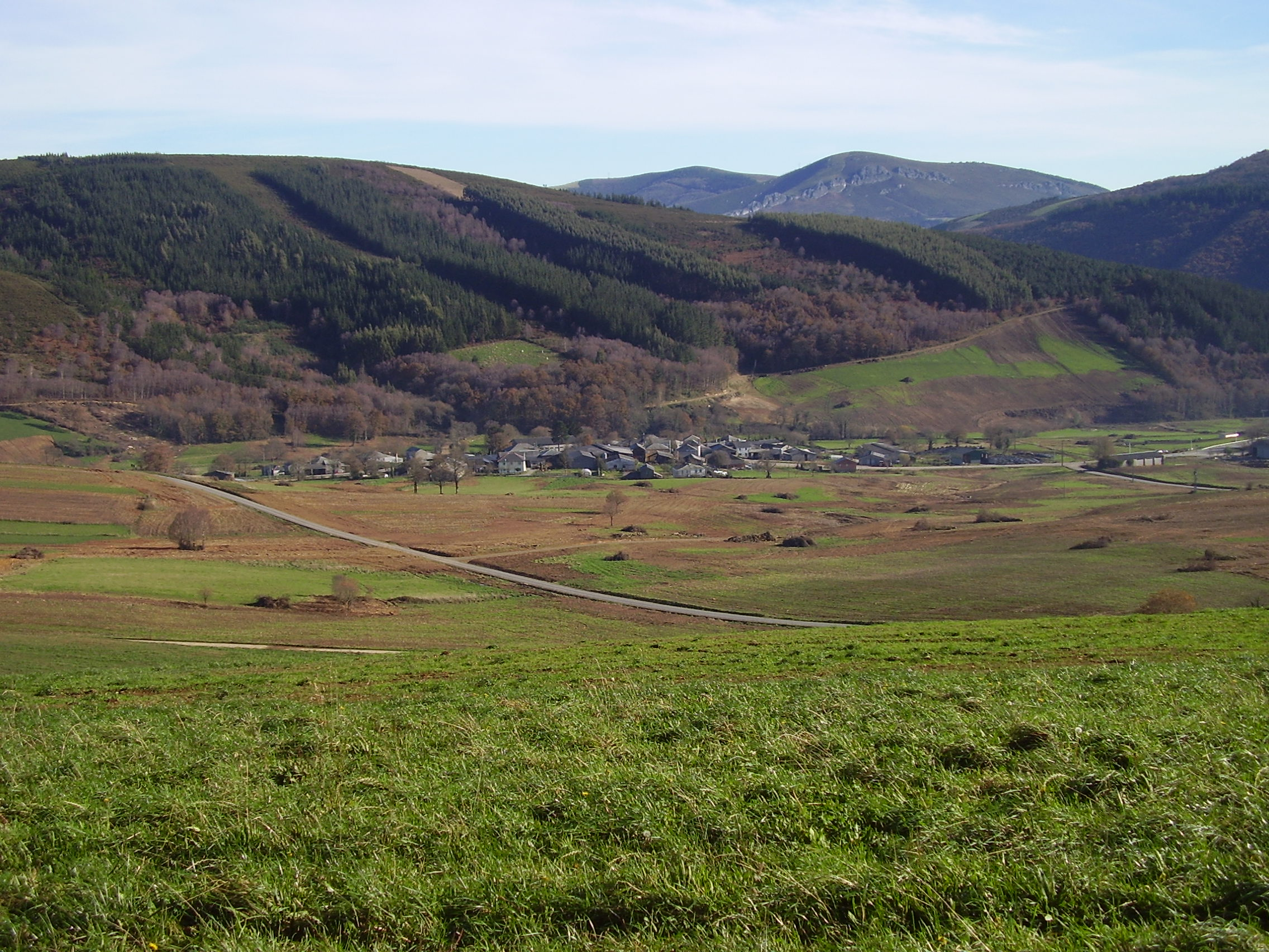 Ano 2009